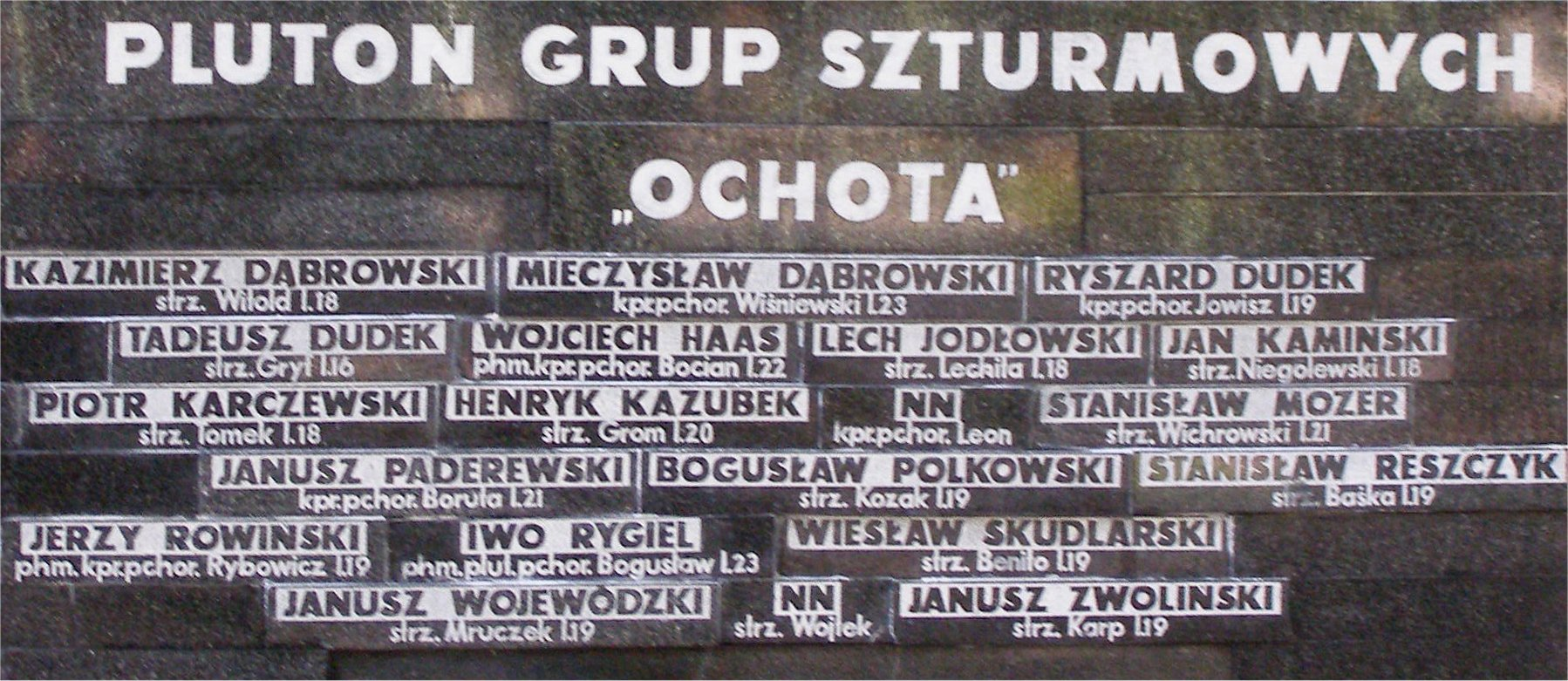 Powązki Wojskowe w Warszawie: Iwo_Rygiel